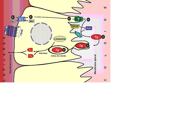 esquema de la sintesis de las hormonas tiroideas